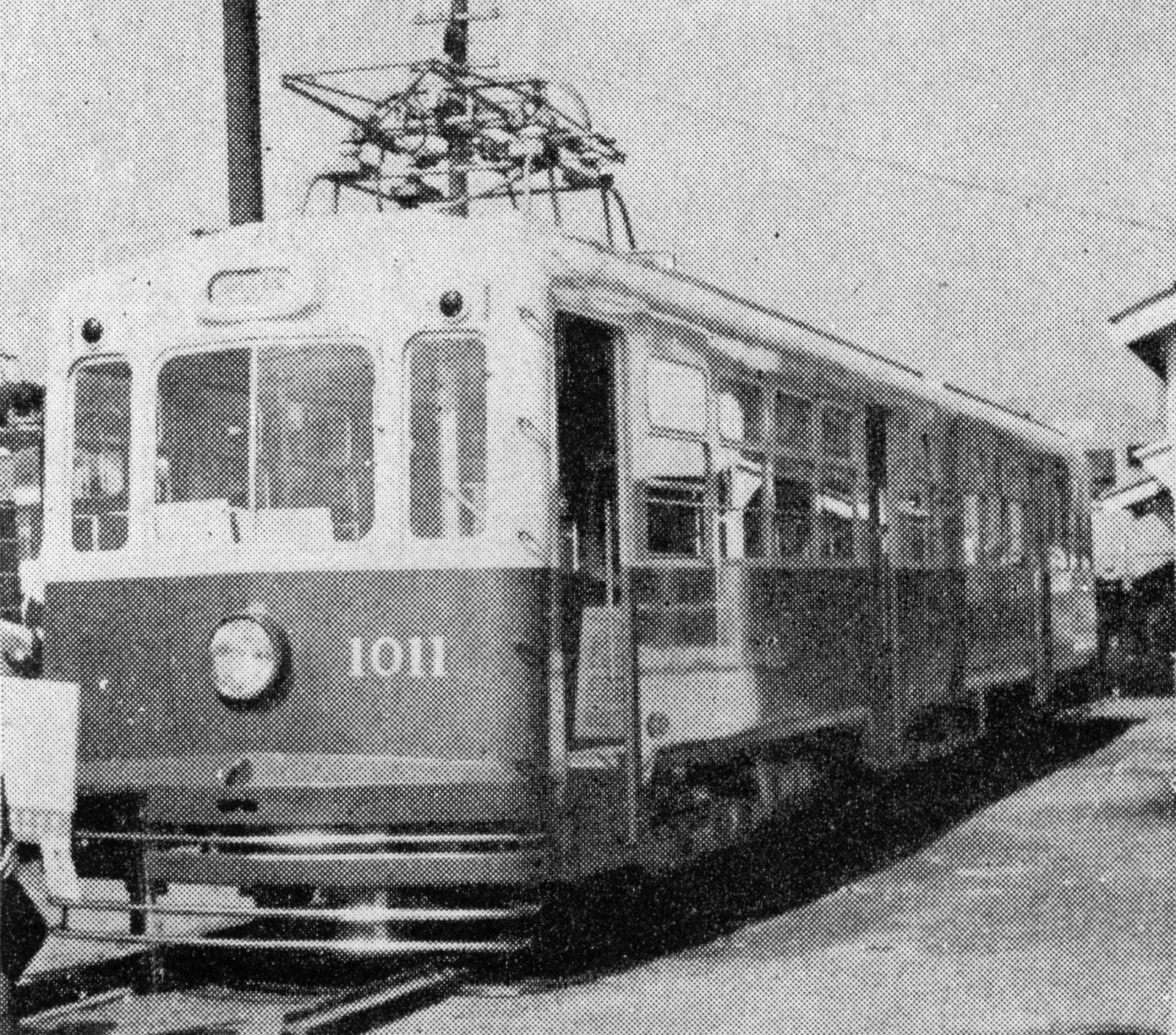 ECAFE（国連アジア極東経済委員会）鉄道展覧会にて展示中の、川崎車輛・西鉄北九州線1000形電車1011。